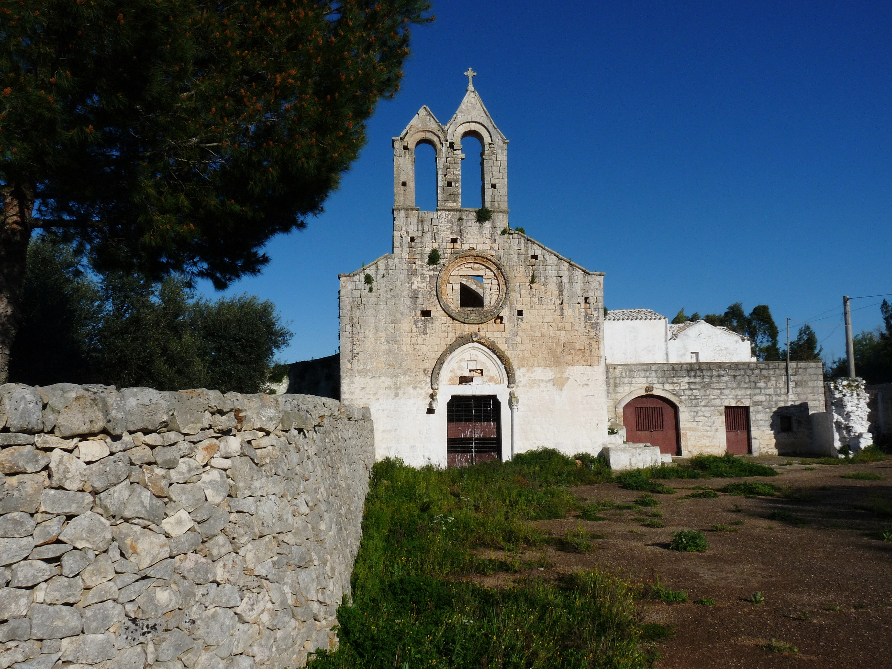 E' un'antichissima (IX secolo d.C.) chiesa in stile gotico, situata sulla vecchia strada che da Ceglie conduce a Francavilla Fontana. La facciata della chiesa è arricchita da un ampio rosone del quale rimane la ghiera esterna e da un campanile a vela. La chiesa versa in uno stato di abbandono. Chiesetta dell'Annunziata: chiesa in stile gotico del XIV secolo.